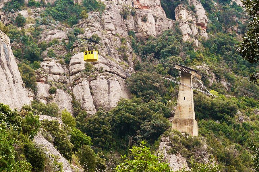 Kolej linowa Montserrat Aeri - podpora.